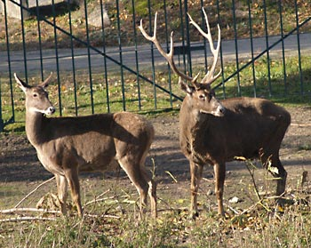 Bildbeschreibung: Weißlippenhirsch (Cervus albirostris) Fotograf/Zeichner: F. Spangenberg (Der Irbis, eigenes Foto) Datum: Oktober 2005